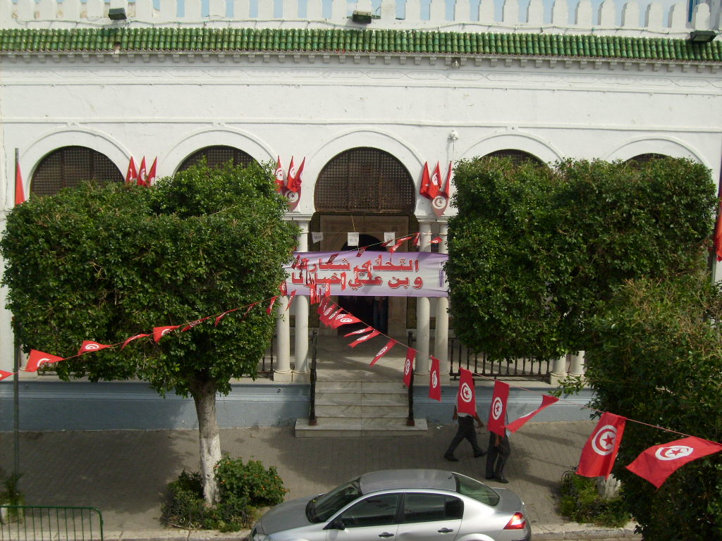 Siège du comité de coordination du Rassemblement constitutionnel démocratique de Tunis-Ville